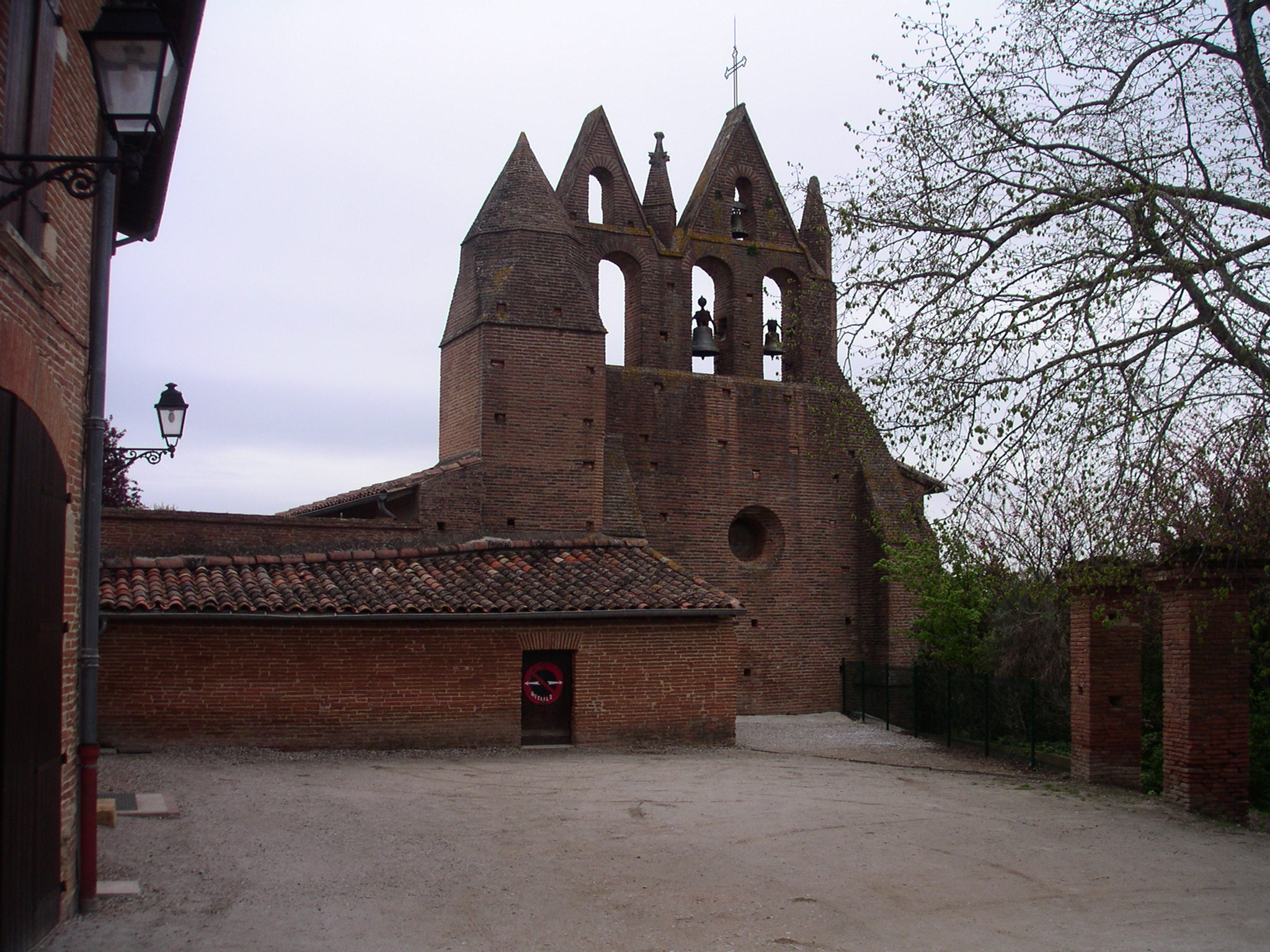 Église de Donneville (31)